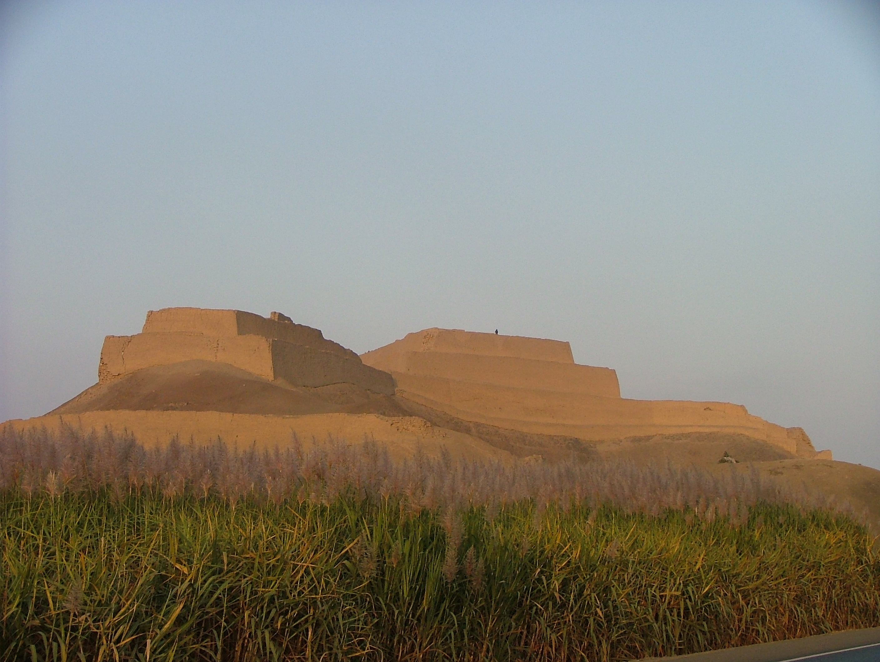 Paramonga, fortaleza y observatorio prehispánico, Lima, Perú.